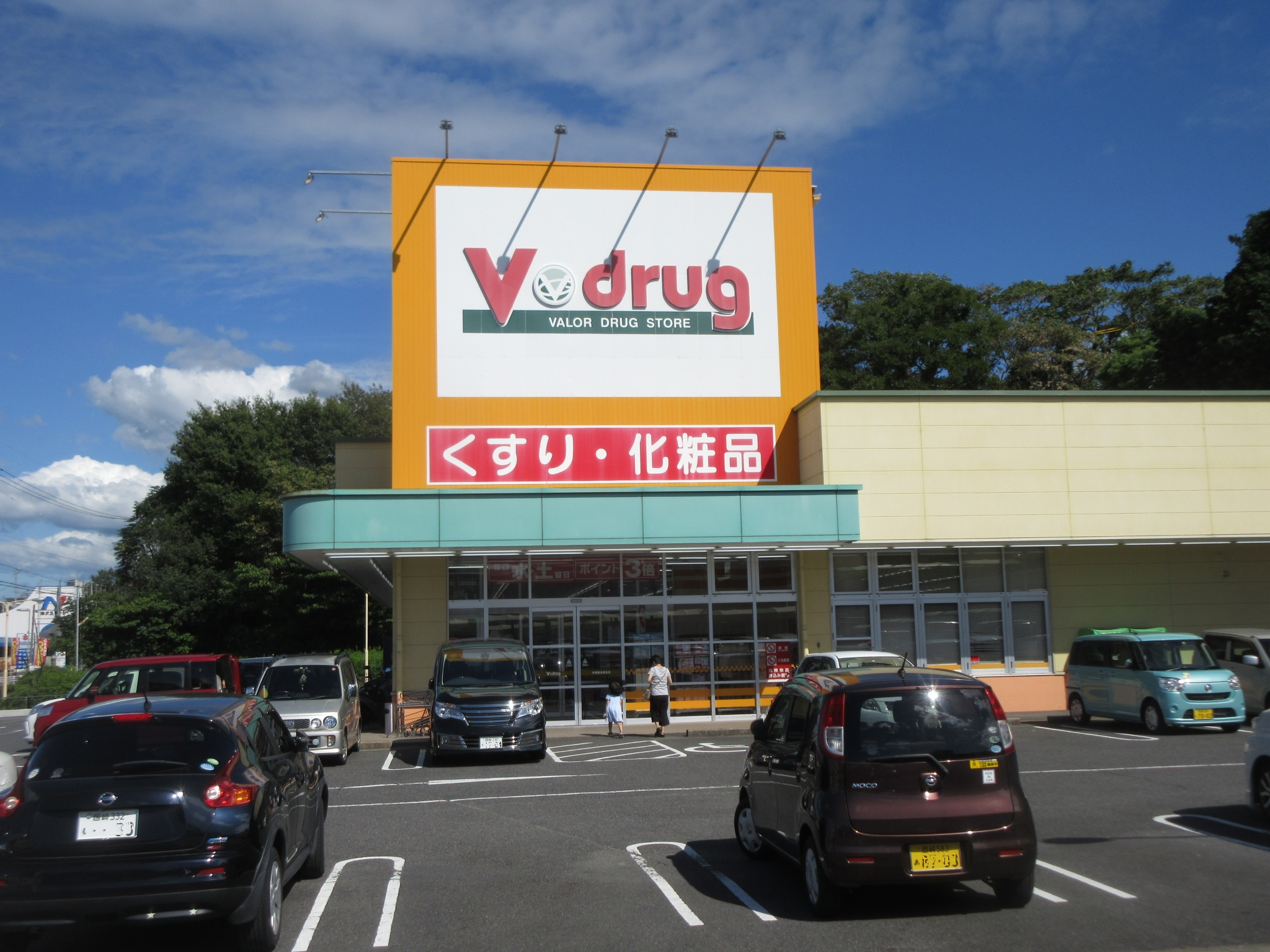 V・durg美合店（岡崎市美合町）